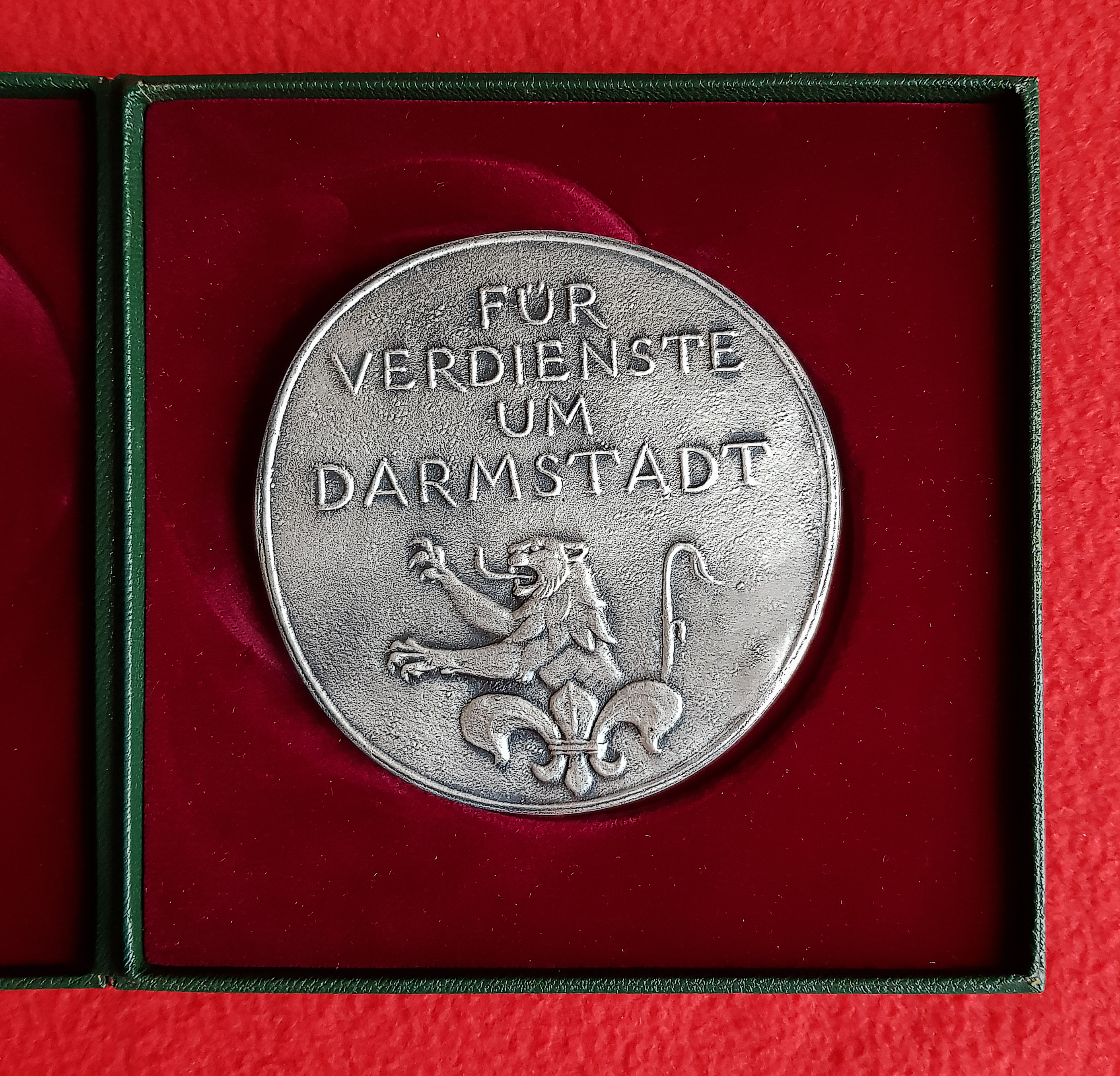 Die Silberne Verdienstplakette Darmstadt wurde mit einer Silbermünze und einer Urkunde verliehen. Hier: Silbernünze für Prof. Dr. Hans-Gerhard Evers, 1965, Rückseite